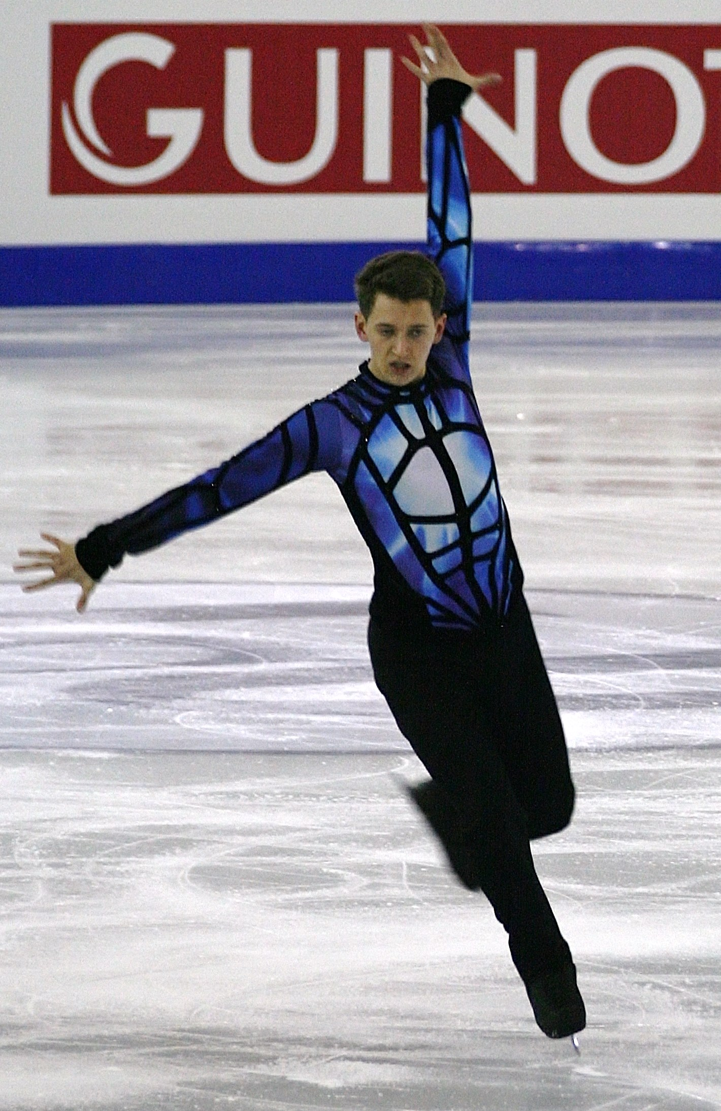 Максим Ковтун (Россия) на финале Гран-при по фигурному катанию 2014-2015.